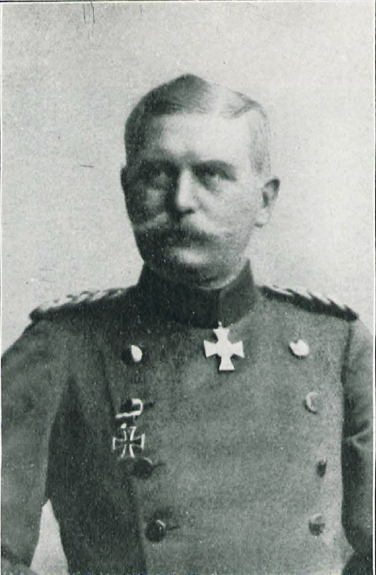 Generalleutnant Otto von Dulitz, von 1901 bis 1906, Kommandeur der 5. Infanterie-Division des Deutschen Kaiserreiches.